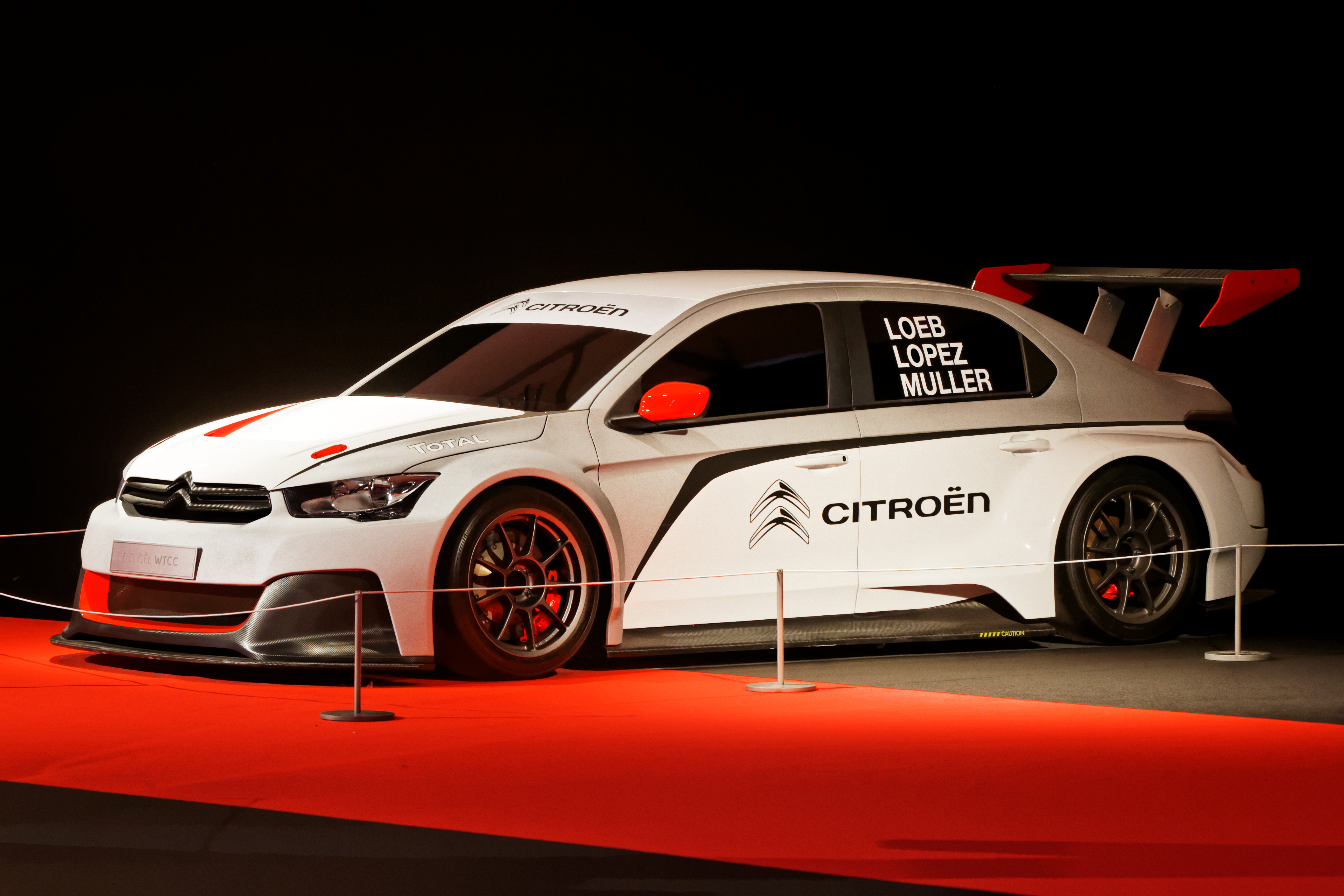 La Citroën C-Elysée exposée lors du festival automobile international 2014.